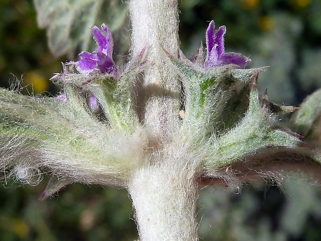 Marrubium alysson (Hierba de la rabia) : Verticilastro - Colonia Illicitana, Albatera (Alicante, España).